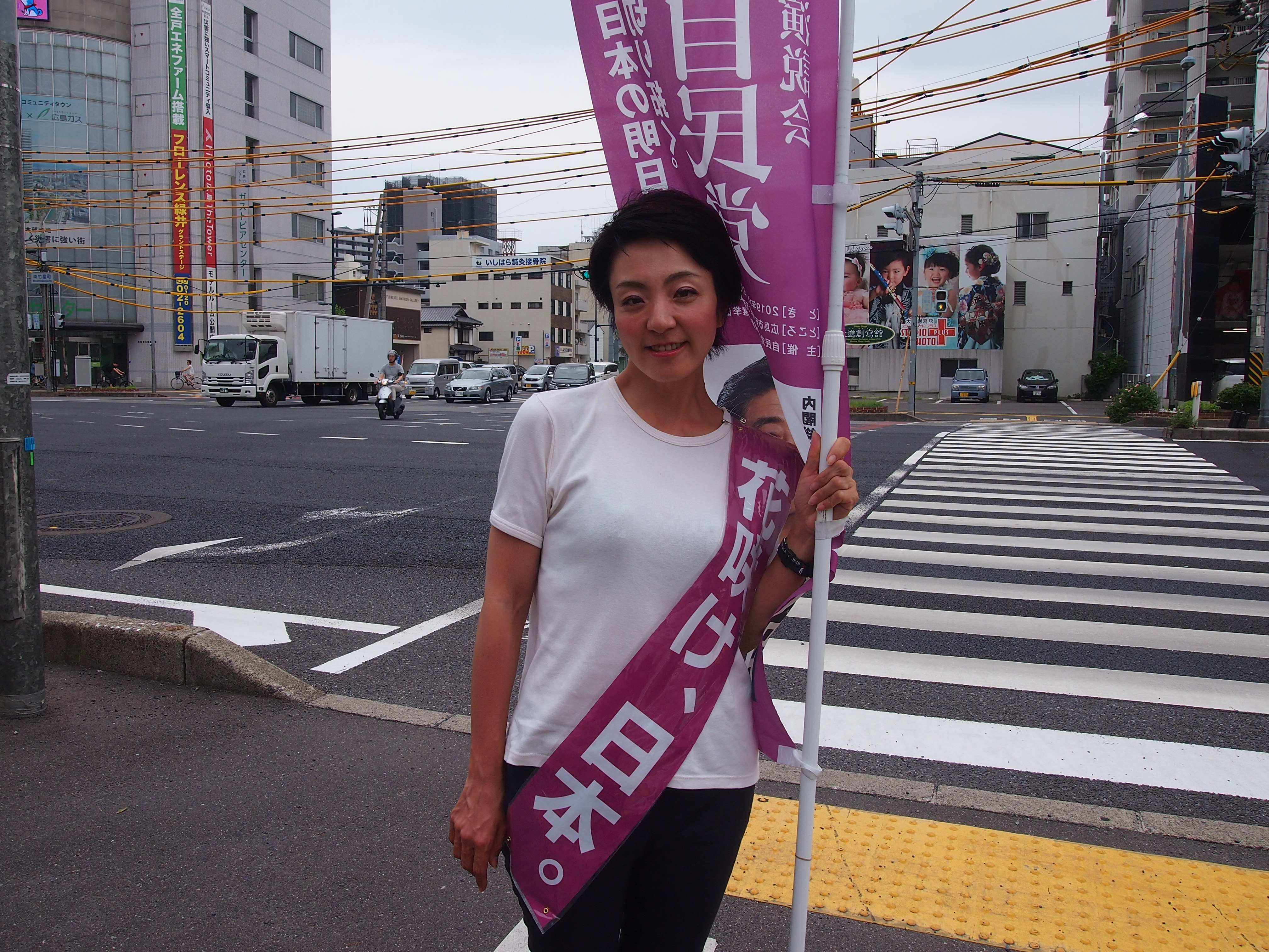 河井案里（河井あんり）、撮影当時参議院選挙出馬予定者。撮影時にウィキペディアへの掲載について説明済み。